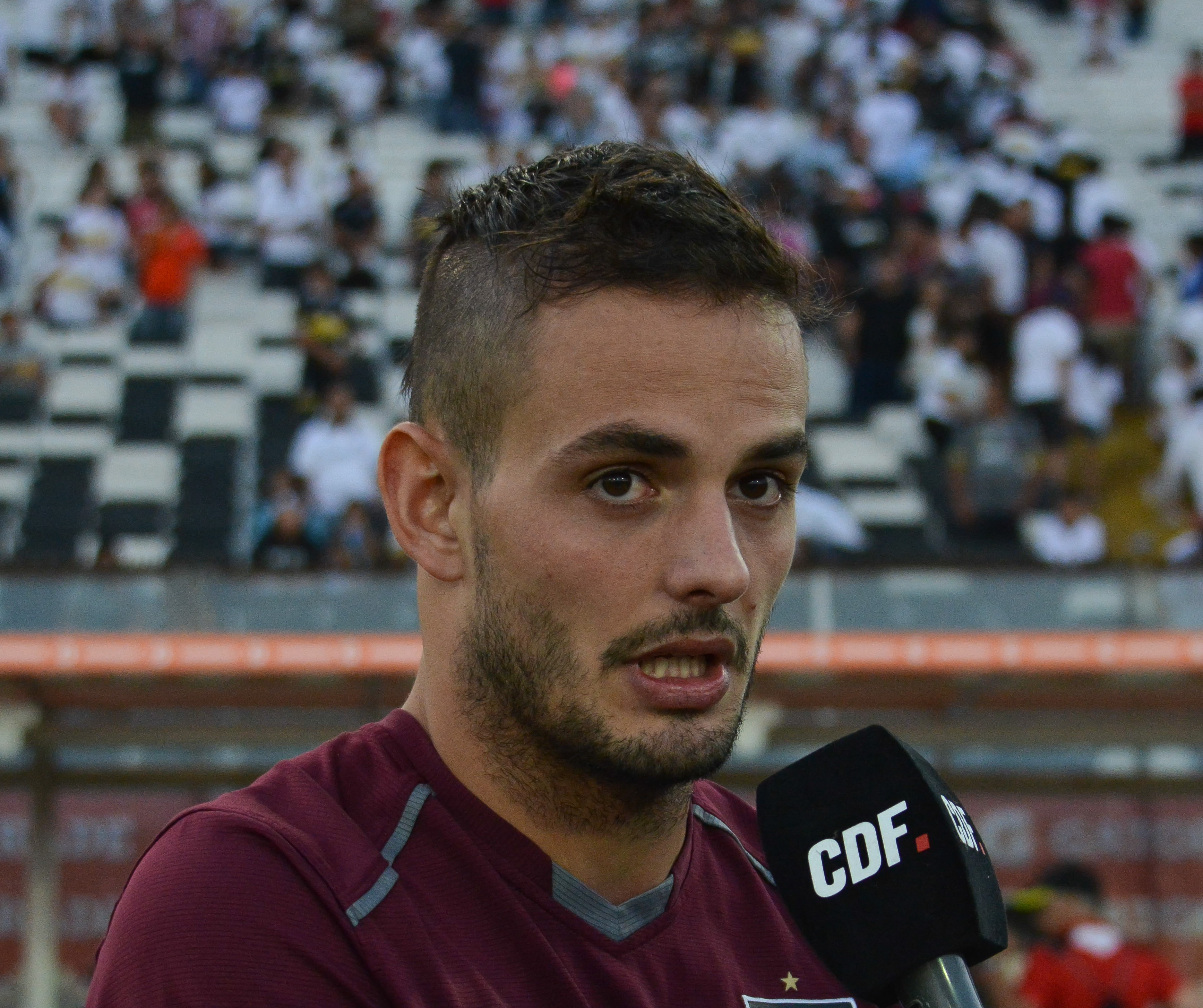 Octavio Rivero, Colo Colo v Huachipato, Estadio Monumental, Santiago, Chile.